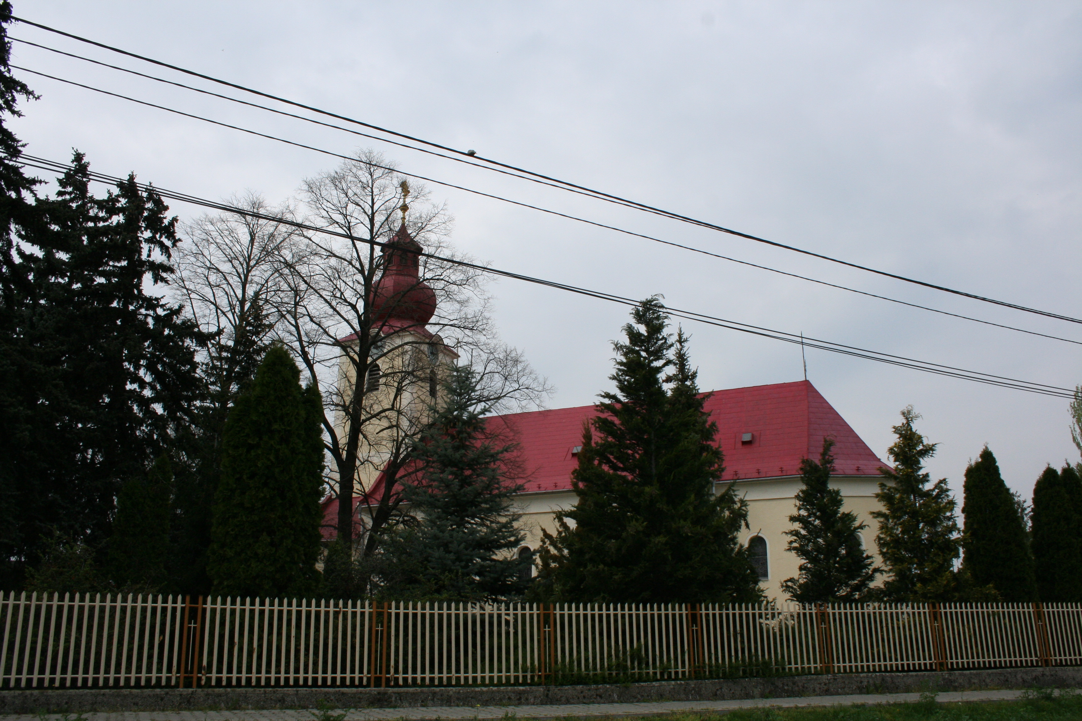 Zsitvabesenyő